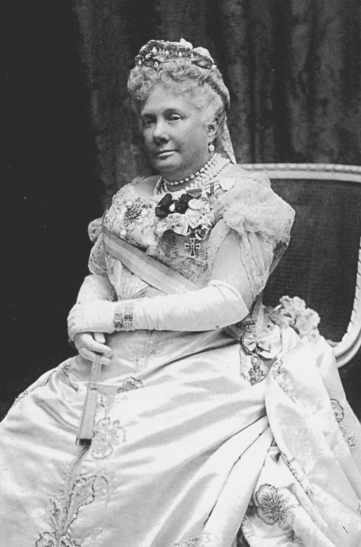 Infanta Isabel de Borbón y Borbón, Infanta de España, Princesa de Asturias, Princesa de las Dos Sicilias y Condesa de Girgenti.